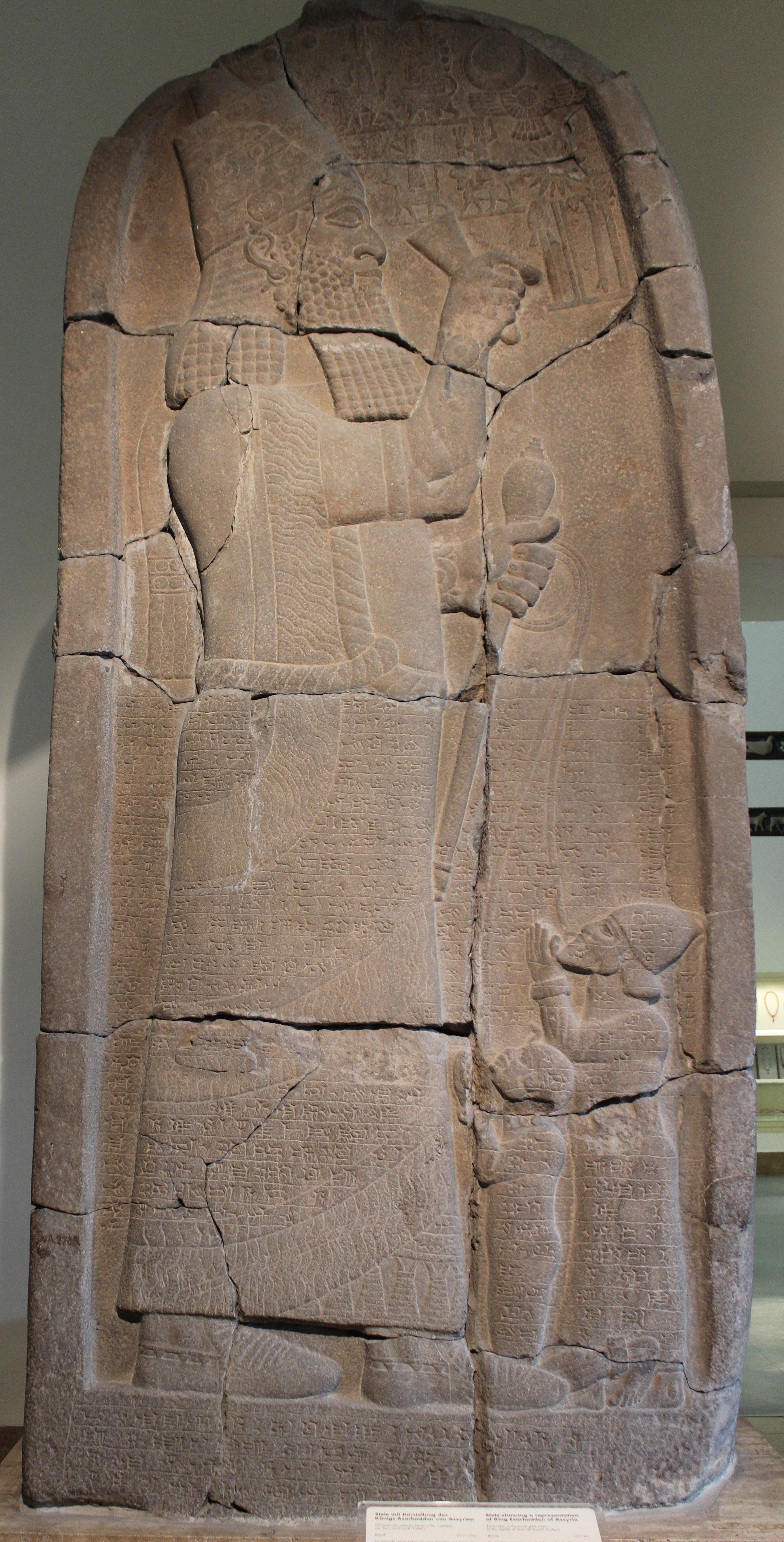 Berlín. Pergamon Museum, estela de Asarhadon. 671 a.C.